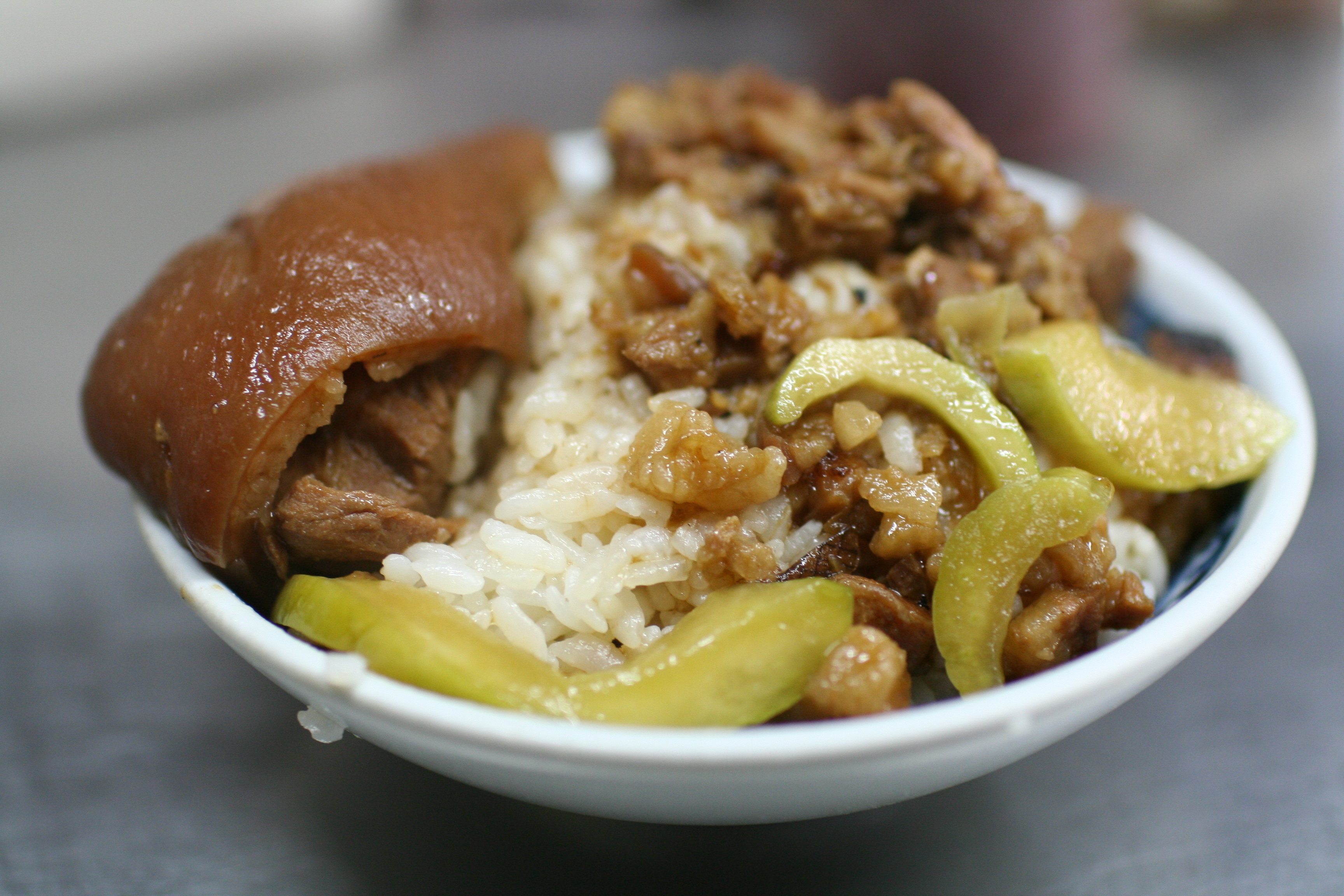 台中第二市場李海魯肉飯